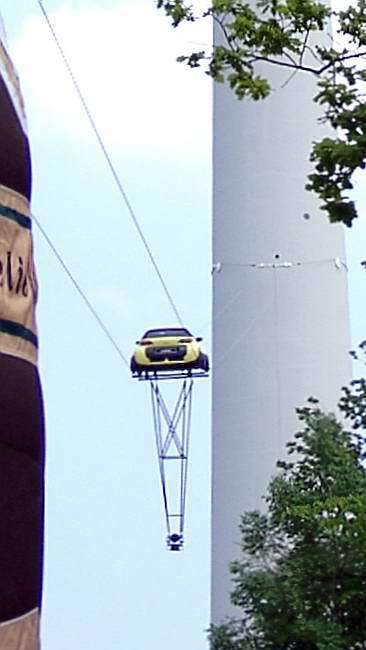 Johann Traber im Smart-Roadster auf Seilen zum Stuttgarter Fernsehturm